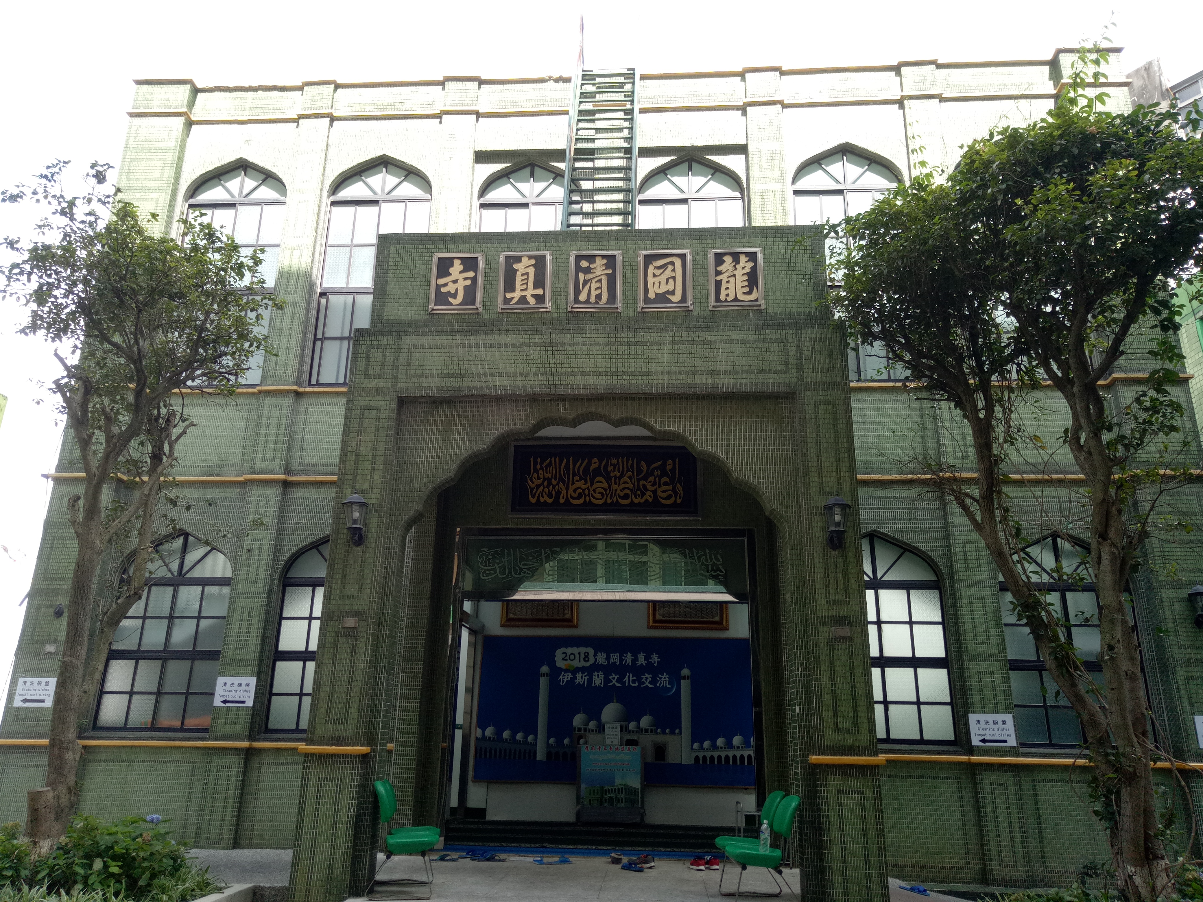 臺灣桃園市龍岡清真寺。(2019年7月)